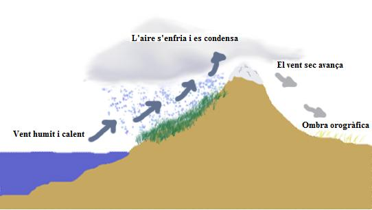 Gràfic explicatiu de l'ombra orogràfica en català.